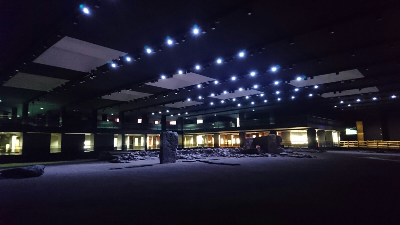 Parco archeologico e museo dell'area megalitica di Saint-Martin-de-Corléans This is a photo of a monument which is part of cultural heritage of Italy.